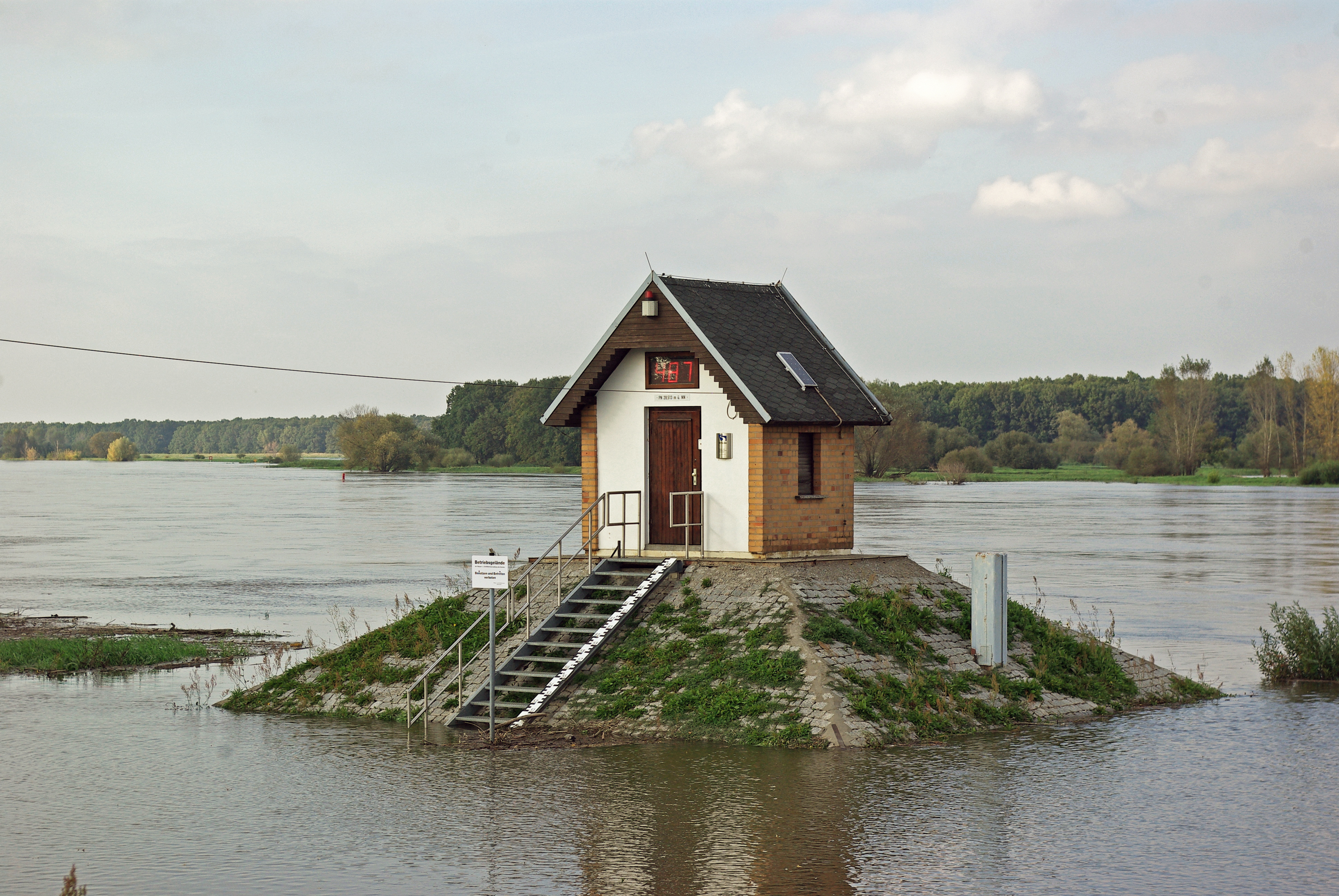 Neißemünde in Brandenburg. Der Pegel steht am Deich im Ort direkt nach der Mündung der Neiße in die Oder. Es wird 4.87 m angezeigt, es besteht Hochwasser.